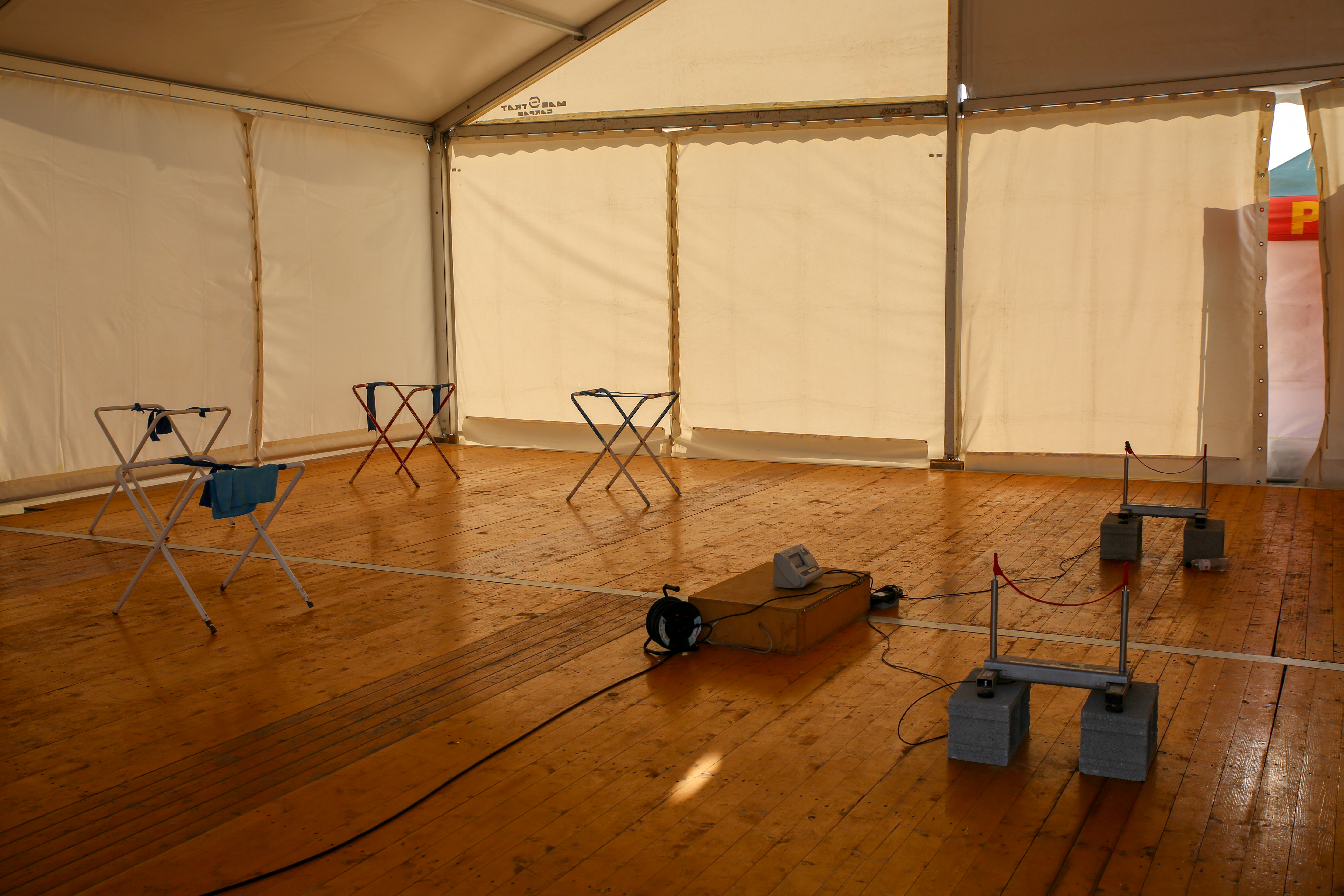 Sala de pesaje de embarcaciones en los Juegos del Mediterráneo 2018